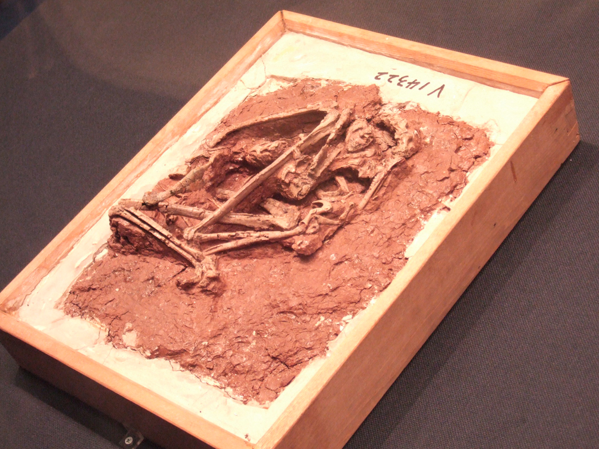 Sinovenator specimen IVPP V14322.